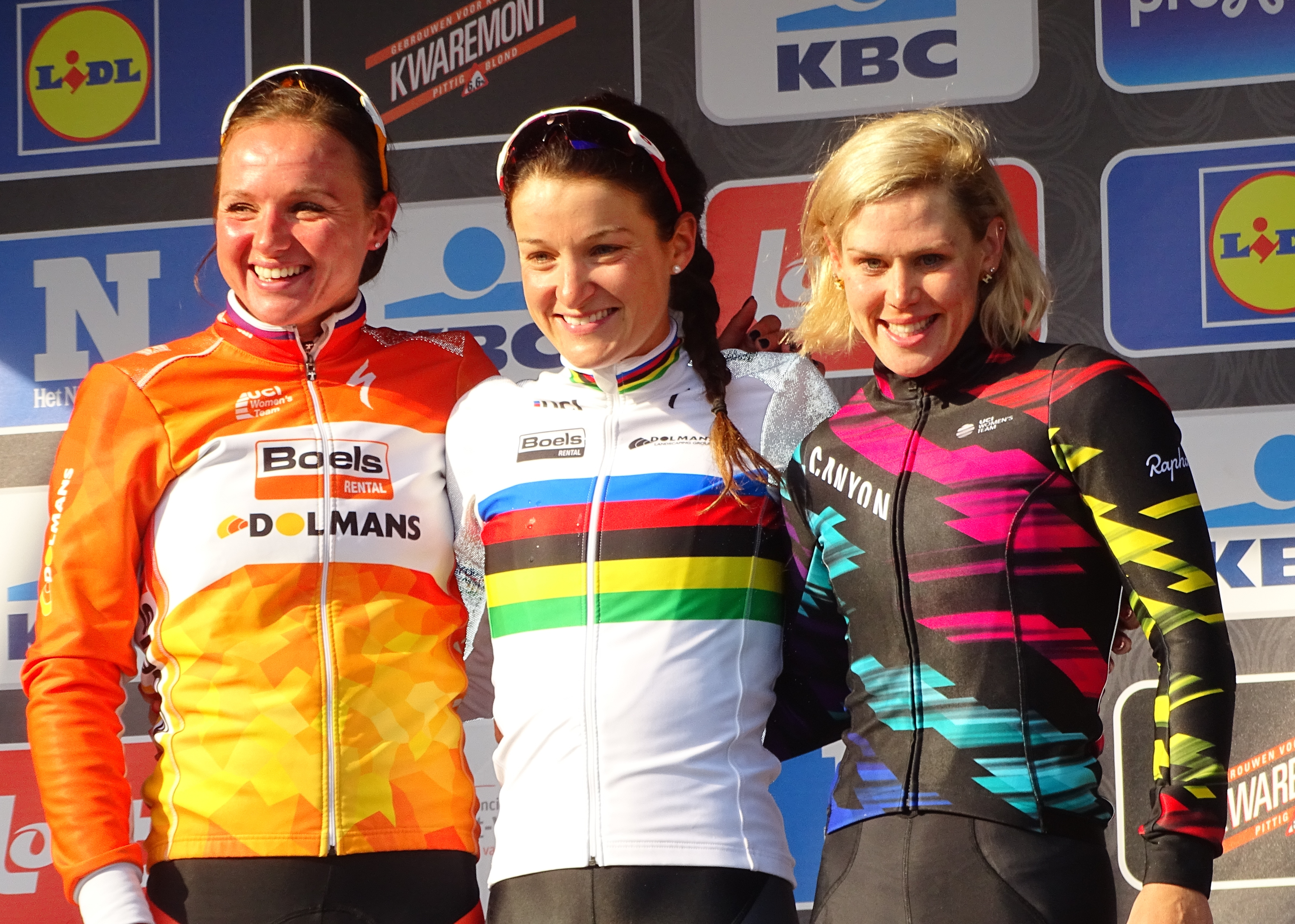 Reportage réalisé le samedi 27 février à l'occasion du départ et de l'arrivée du Circuit Het Nieuwsblad 2016 et de l'arrivée du Circuit Het Nieuwsblad féminin 2016 à Gand, Belgique.